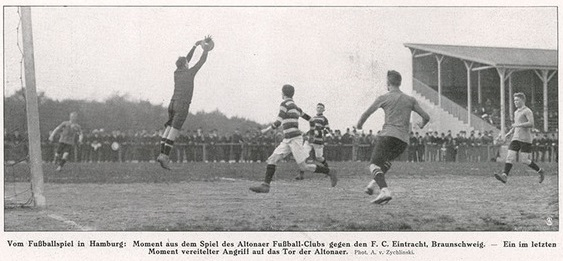 Vom Fußballspiel in Hamburg: Moment aus dem Spiel des Altonaer Fußball-Clubs gegen den F. C. Eintracht Braunschweig. Norddeutsche Fußballmeisterschaft 1911/12